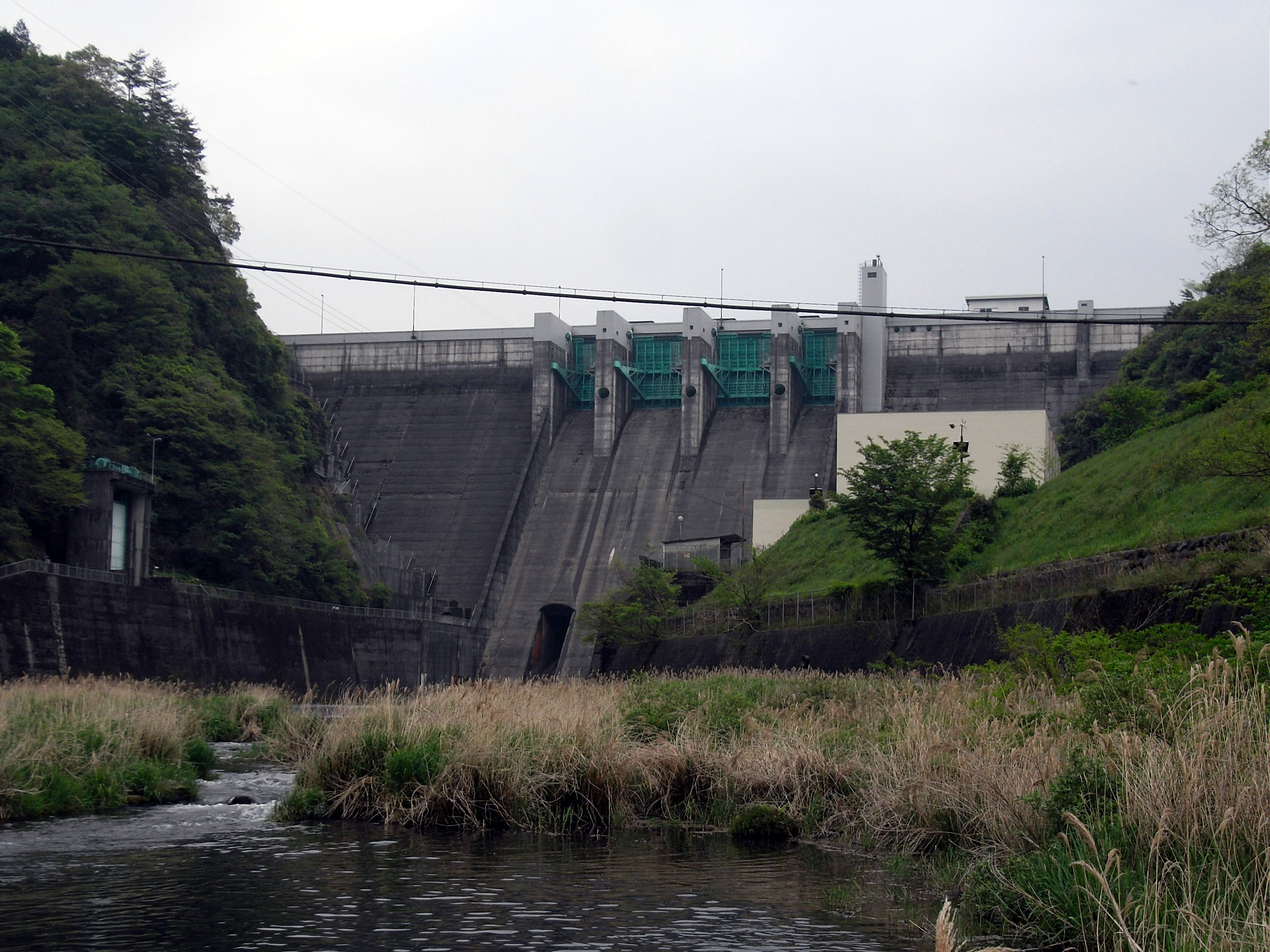 Dam